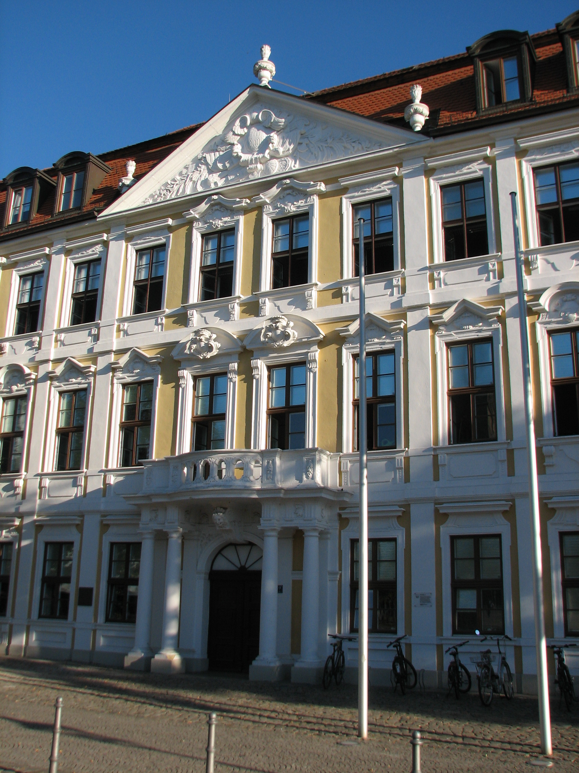 Domplatz 8